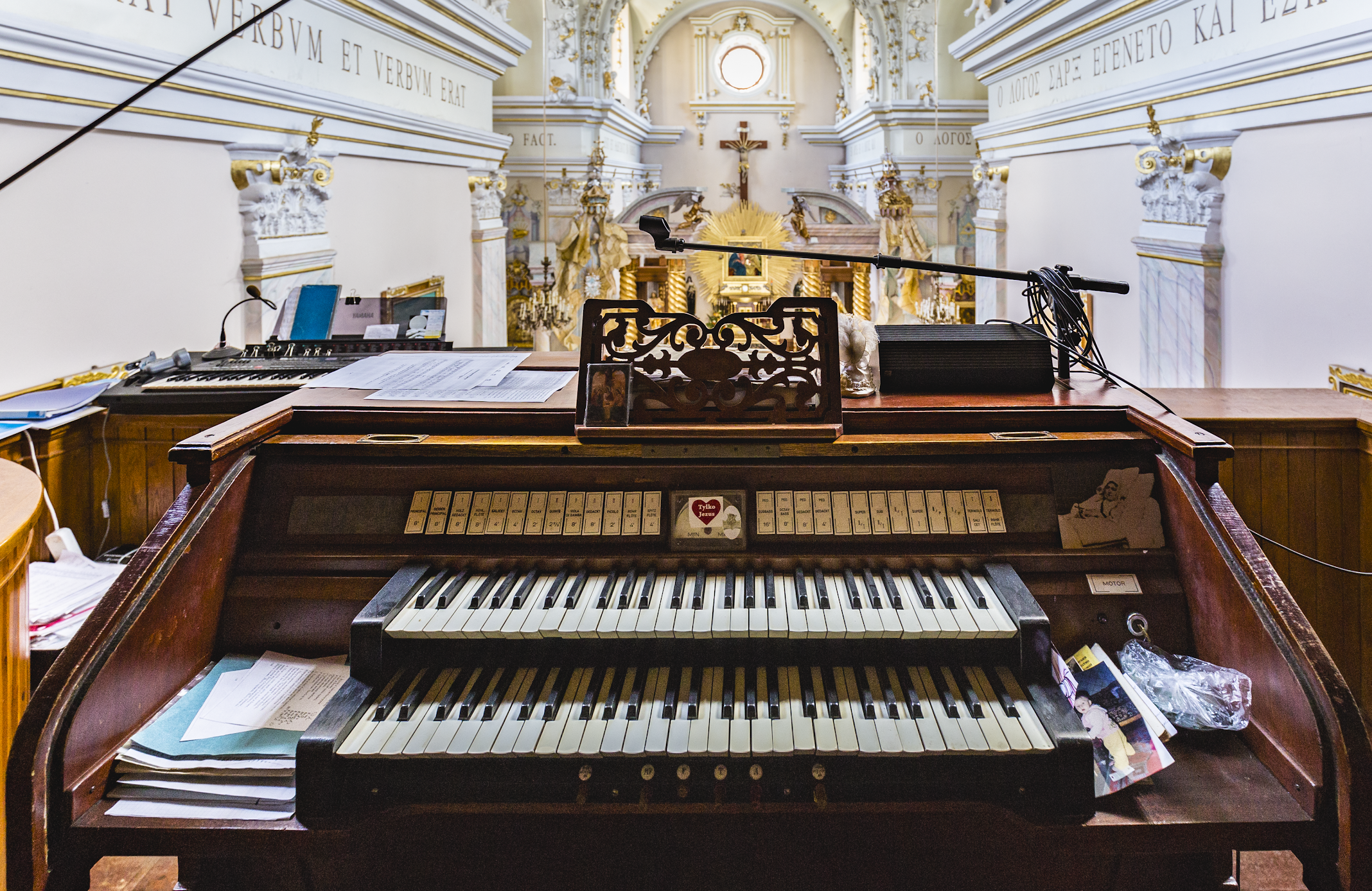 орган костел Полонне